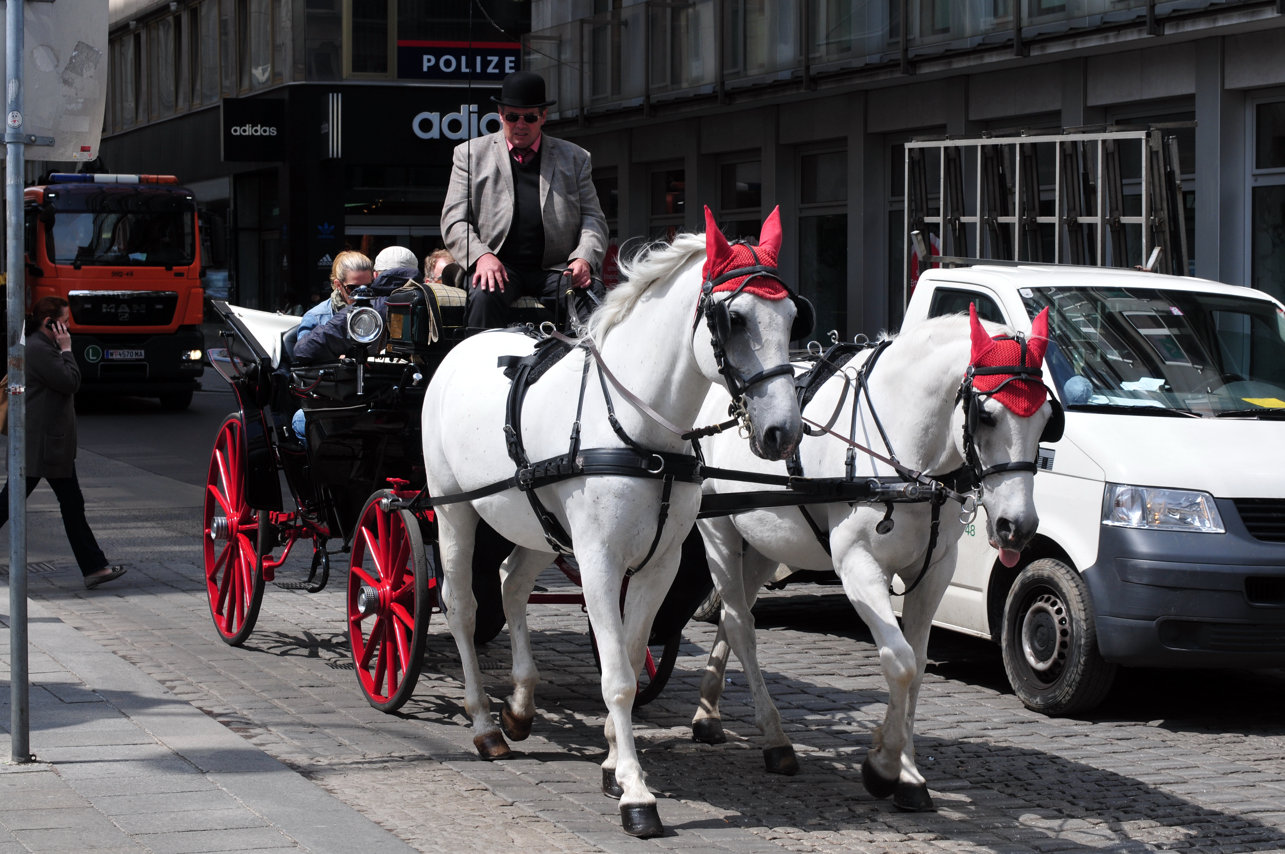 Wien, Stadtzentrum, 1 h fotografieren mit 50 mm Festbrennweite